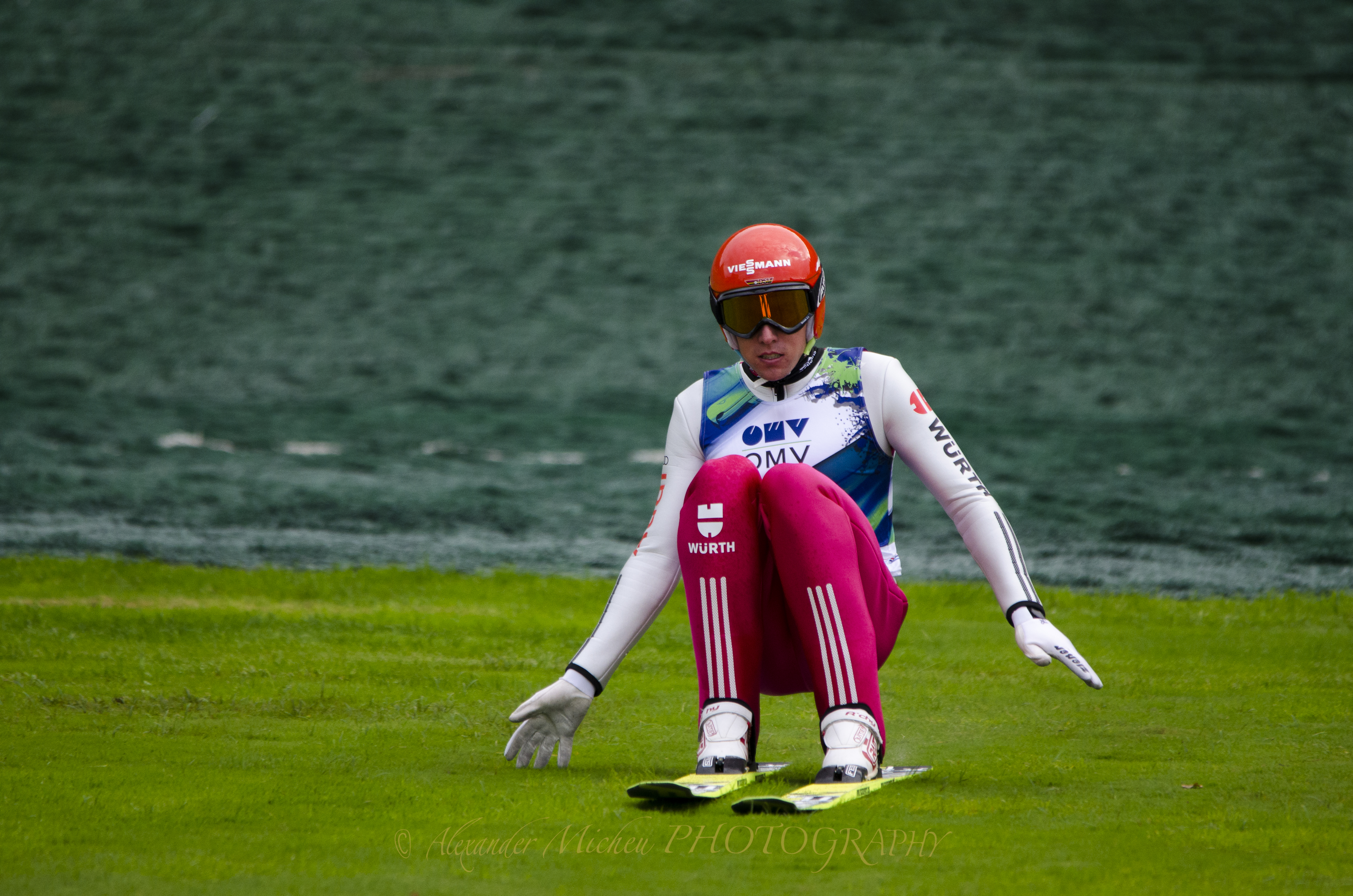 FIS Sommer Grand Prix Nordische Kombination 27. / 28. August 2013 Villach Möltschach